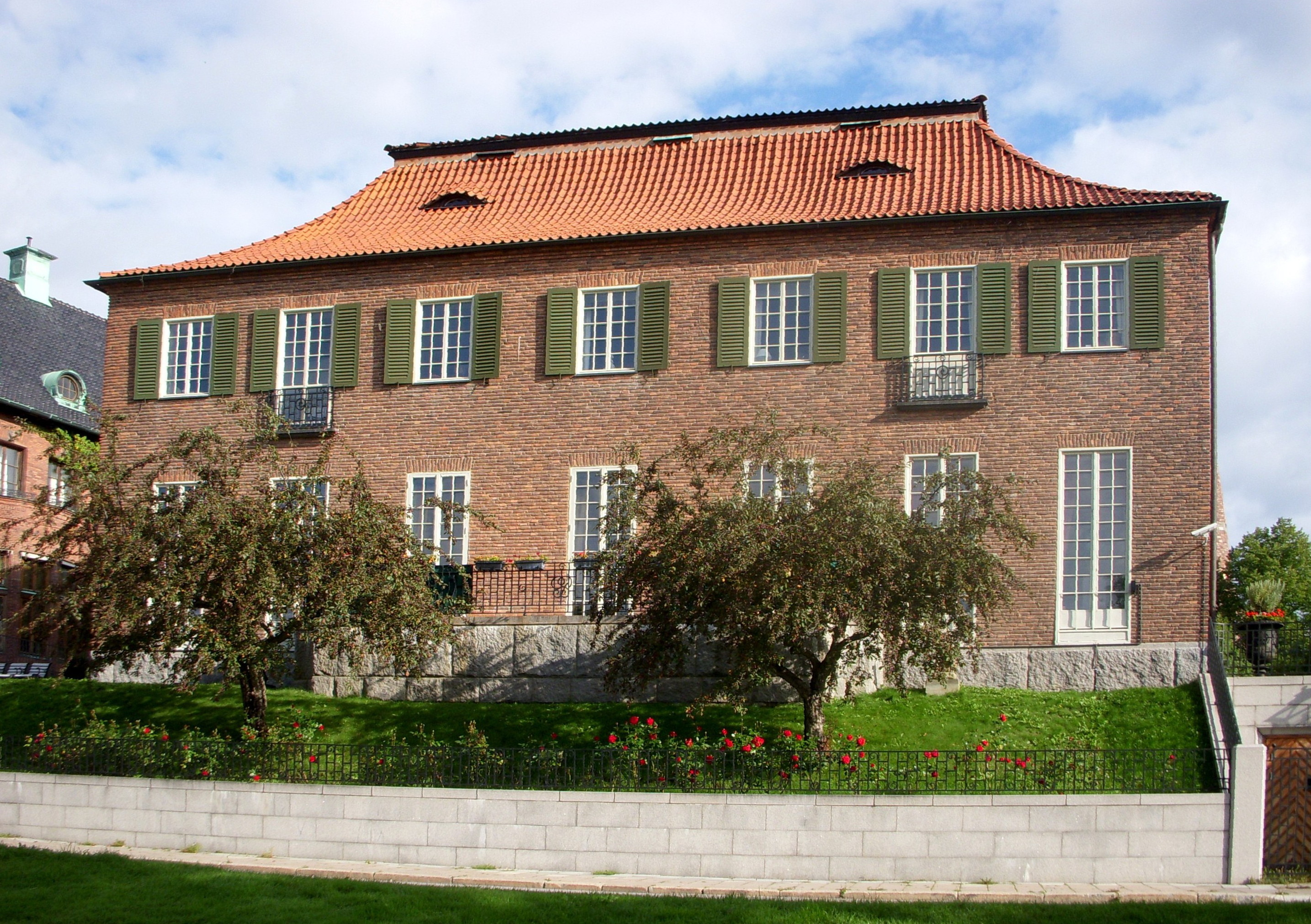 Diplomatstaden i Stockholm, Kv. Diplomaten nr 2, "Viller Geber", arkitekt Ragnar Östberg